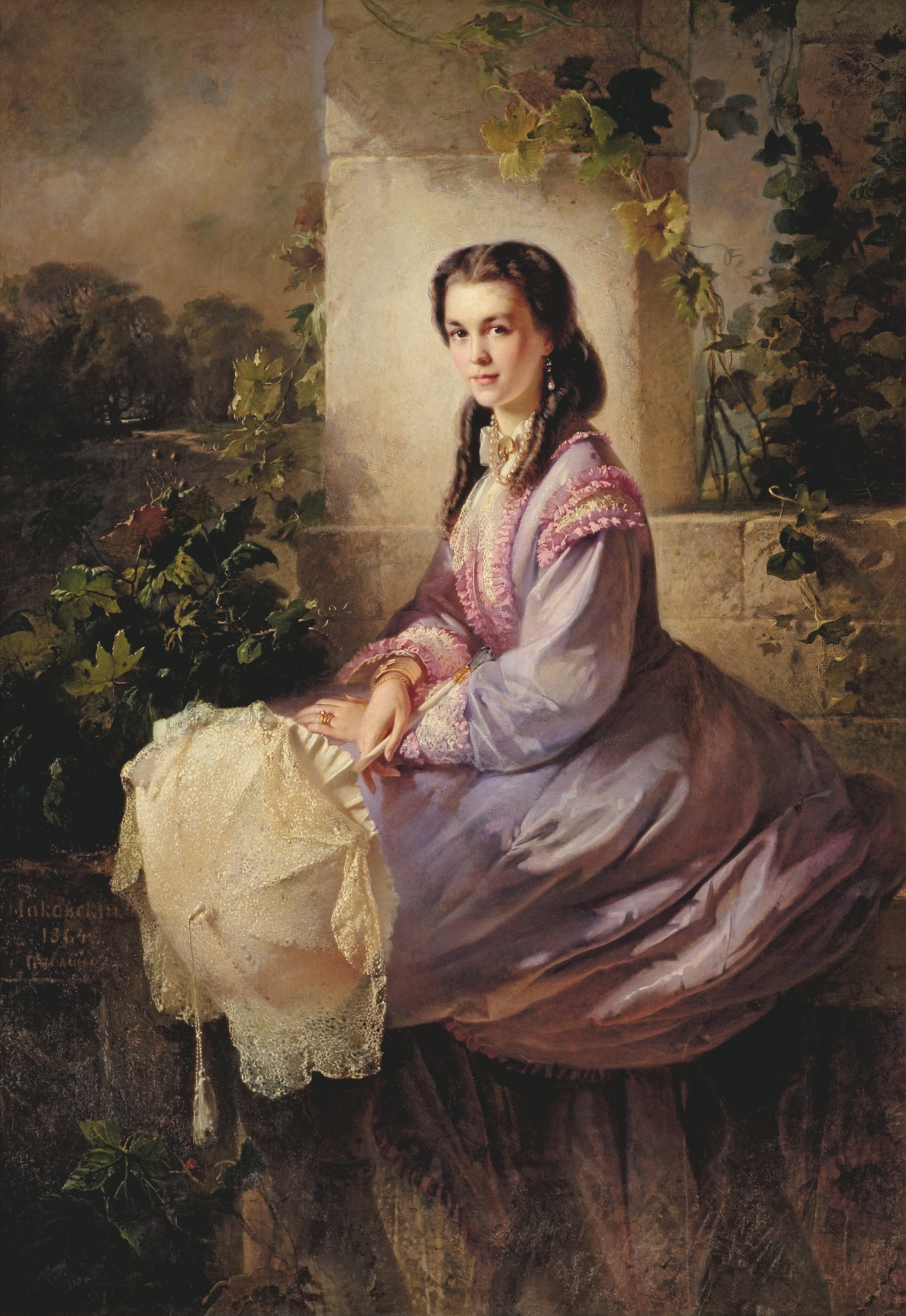 Портрет графини Софьи Илларионовны Строгановой, ур. Васильчиковой (14.02.1841 – 30.06.1871). ГТГ